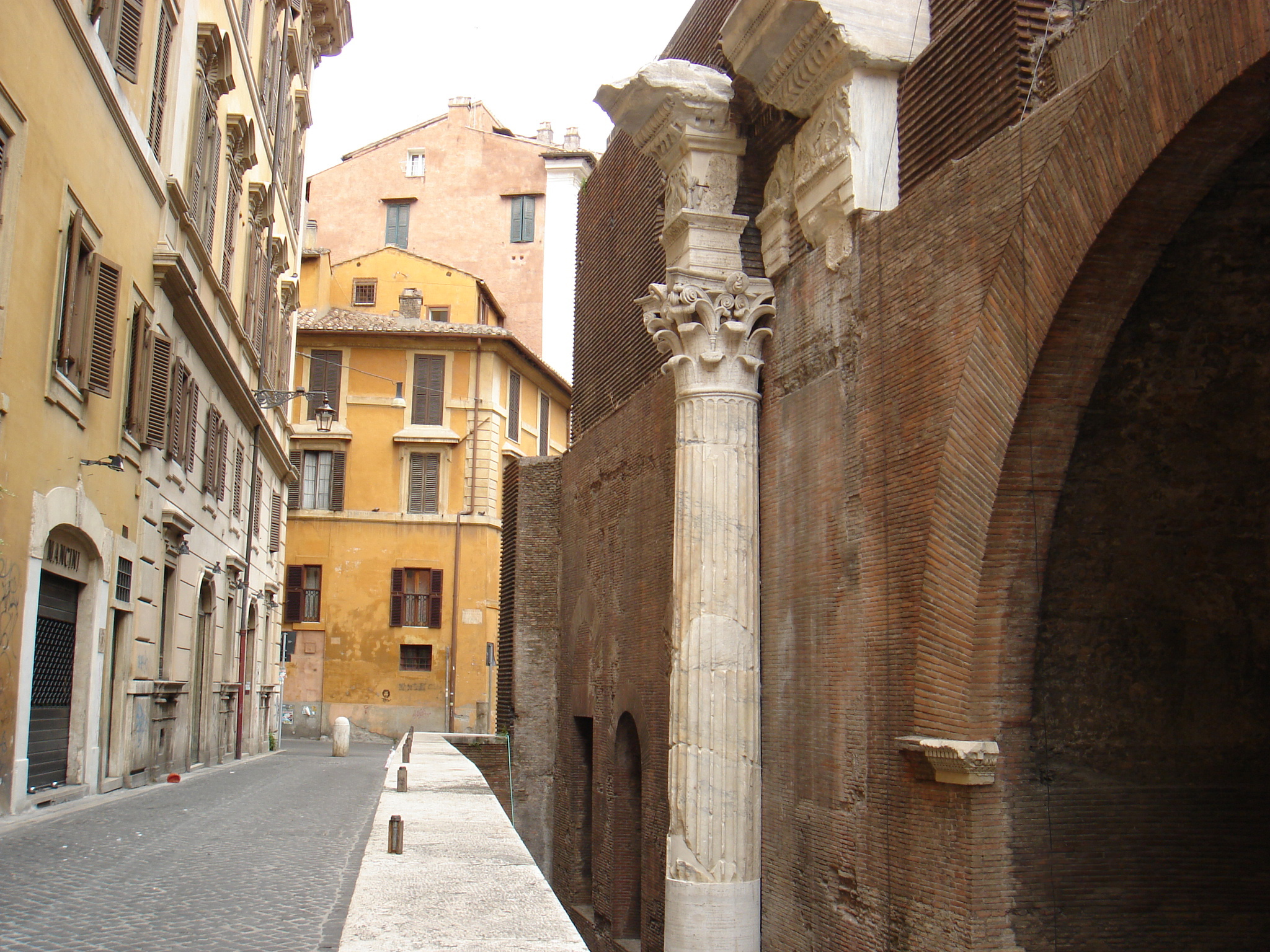 Roma, rione Pigna: via della Palombella e basilica di Nettuno (dietro il Pantheon)